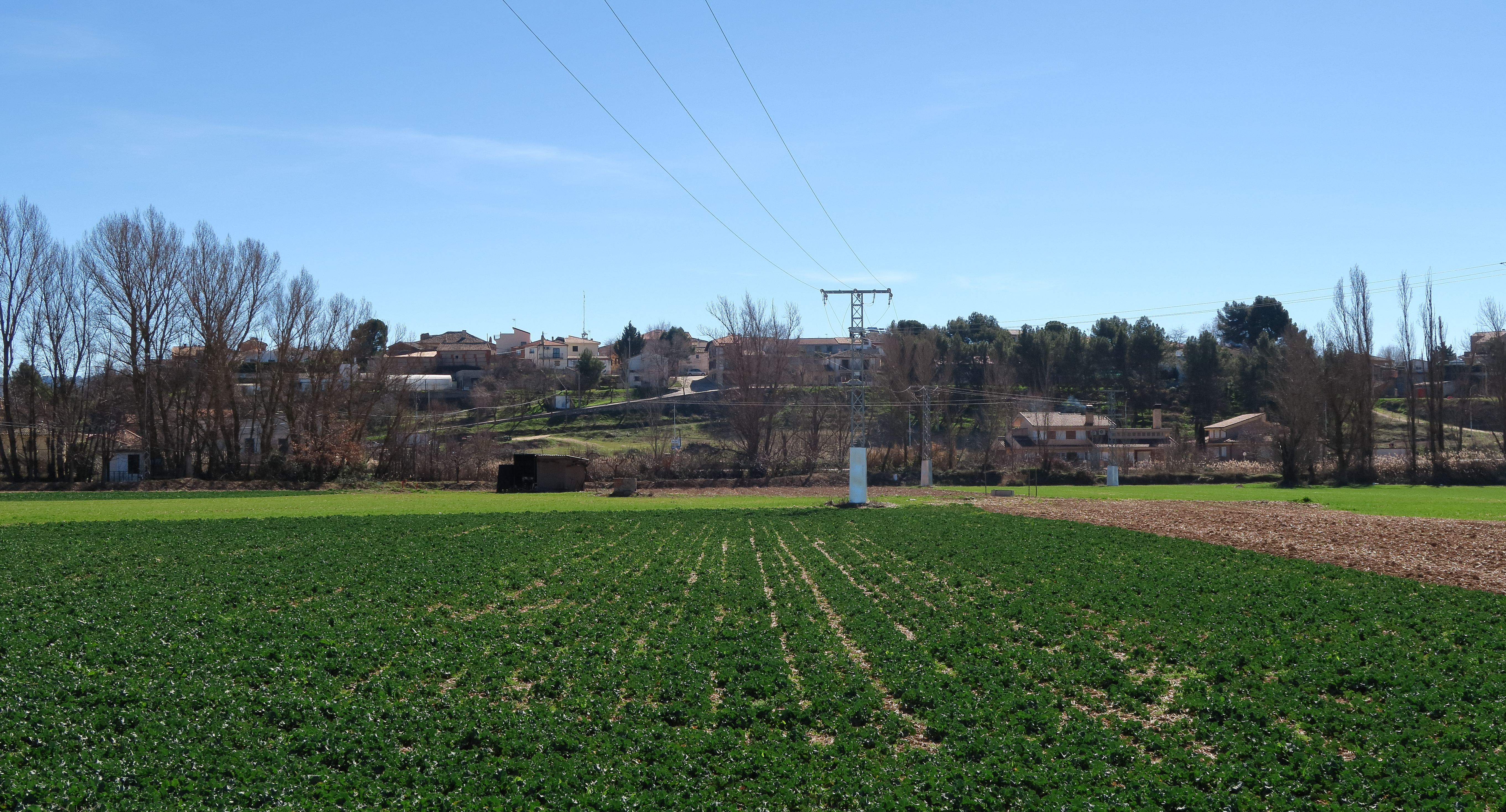 Torre del Burgo